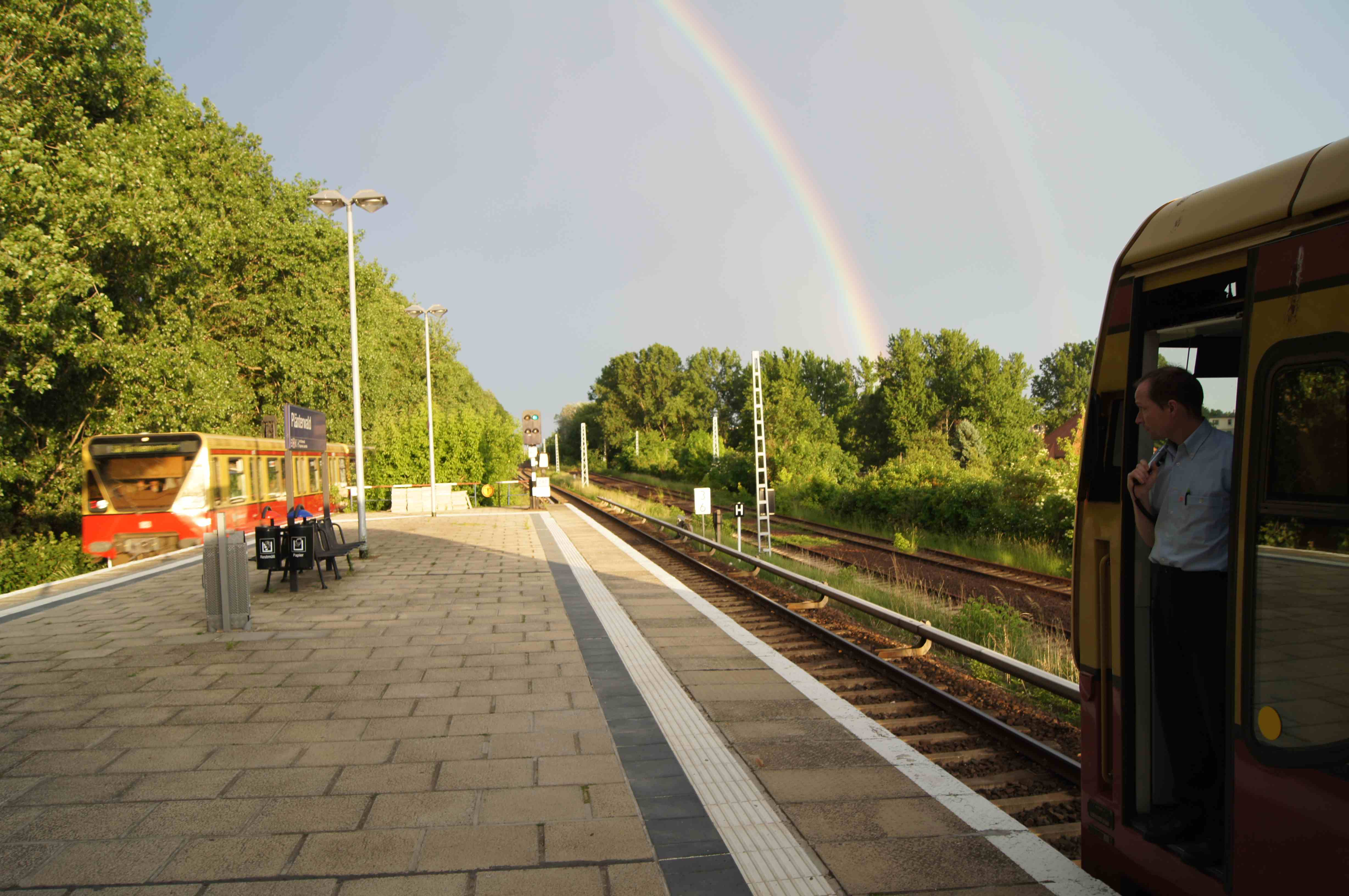 S-Bahn Plänterwald